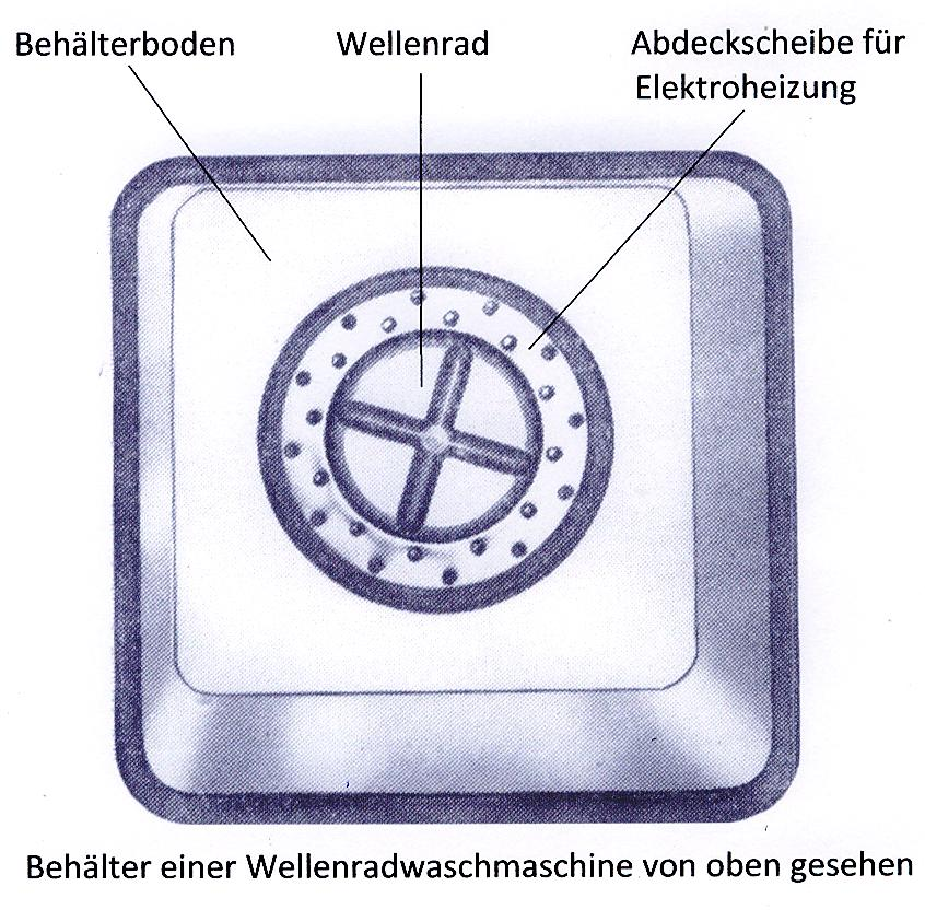 Behälter mit Wellenrad (Ansicht von oben)